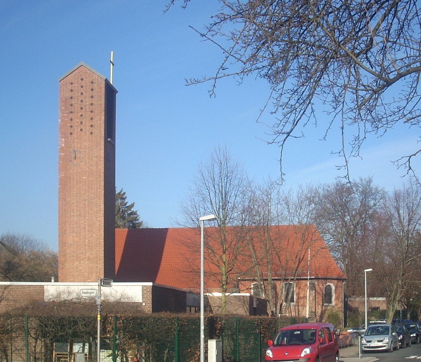 Hannover-Anderten, evang. St.-Martins-Kirche